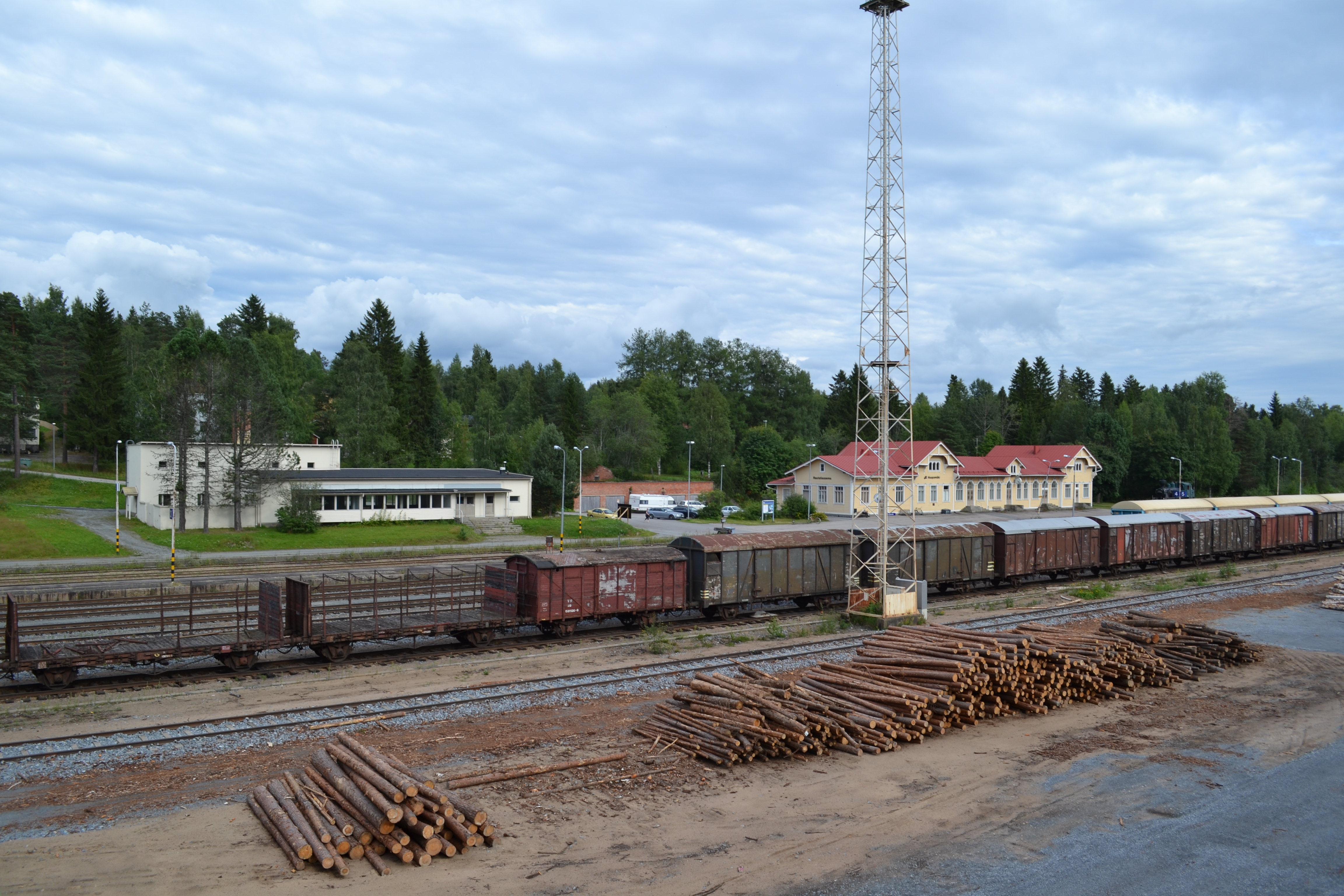 Haapamäen asemaravintola ja rautatieasema